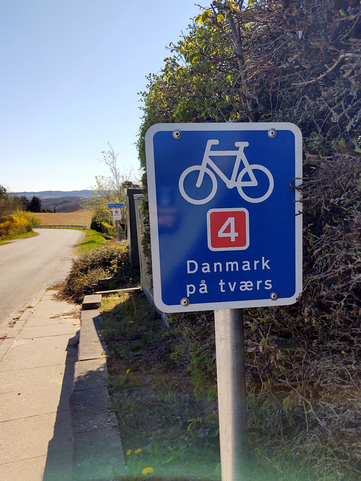 Skiltning af Danmark på tværs (N4), en af Danmarks nationale cykelruter.